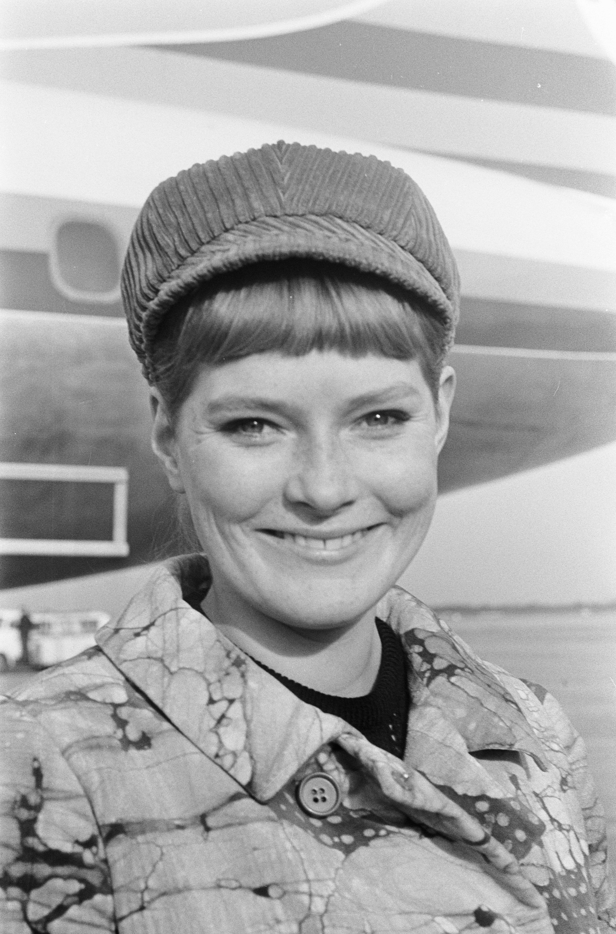 Collectie / Archief : Fotocollectie Anefo Reportage / Serie : Aankomst van de Amerikaanse actrice Ulla Bergryd op Schiphol, die in de film The Bible de rol van Eva speelt Beschrijving : aankomst en vertrek, acteurs, portretten Datum : 29 oktober 1966 Locatie : Noord-Holland, Schiphol Trefwoorden : aankomst en vertrek, acteurs, portretten Persoonsnaam : Bergryd, Ulla Fotograaf : Fotograaf Onbekend / Anefo Auteursrechthebbende : Nationaal Archief Materiaalsoort : Negatief (zwart/wit) Nummer archiefinventaris : bekijk toegang 2.24.01.05 Bestanddeelnummer : 919-7365